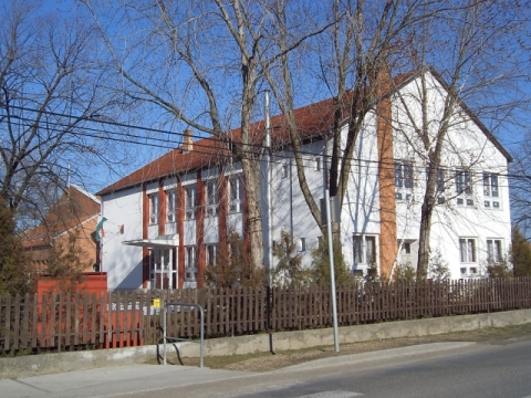 Általános iskola, Kakucs, Pest megye